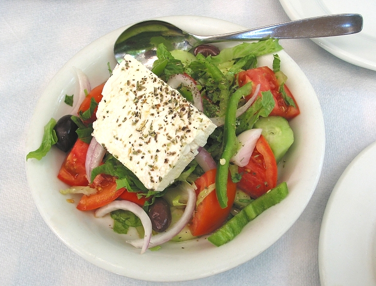 Greek salad, Choriatiki